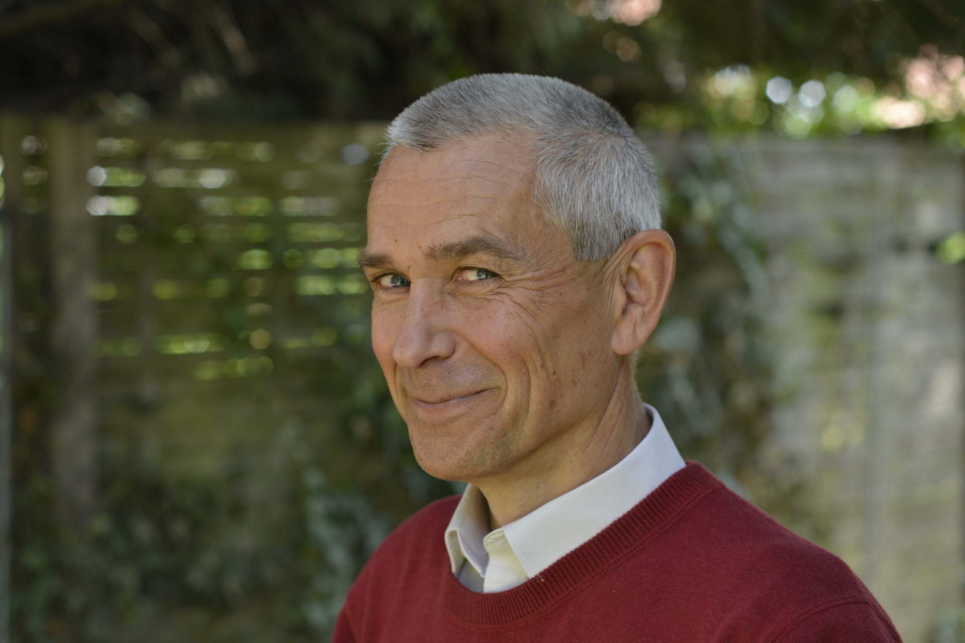 Das vorliegende Foto wurde am 07.09.2018 von Peter Christian Endler zur Veröffentlichung in Wikipedia aufgenommen und freigegeben.